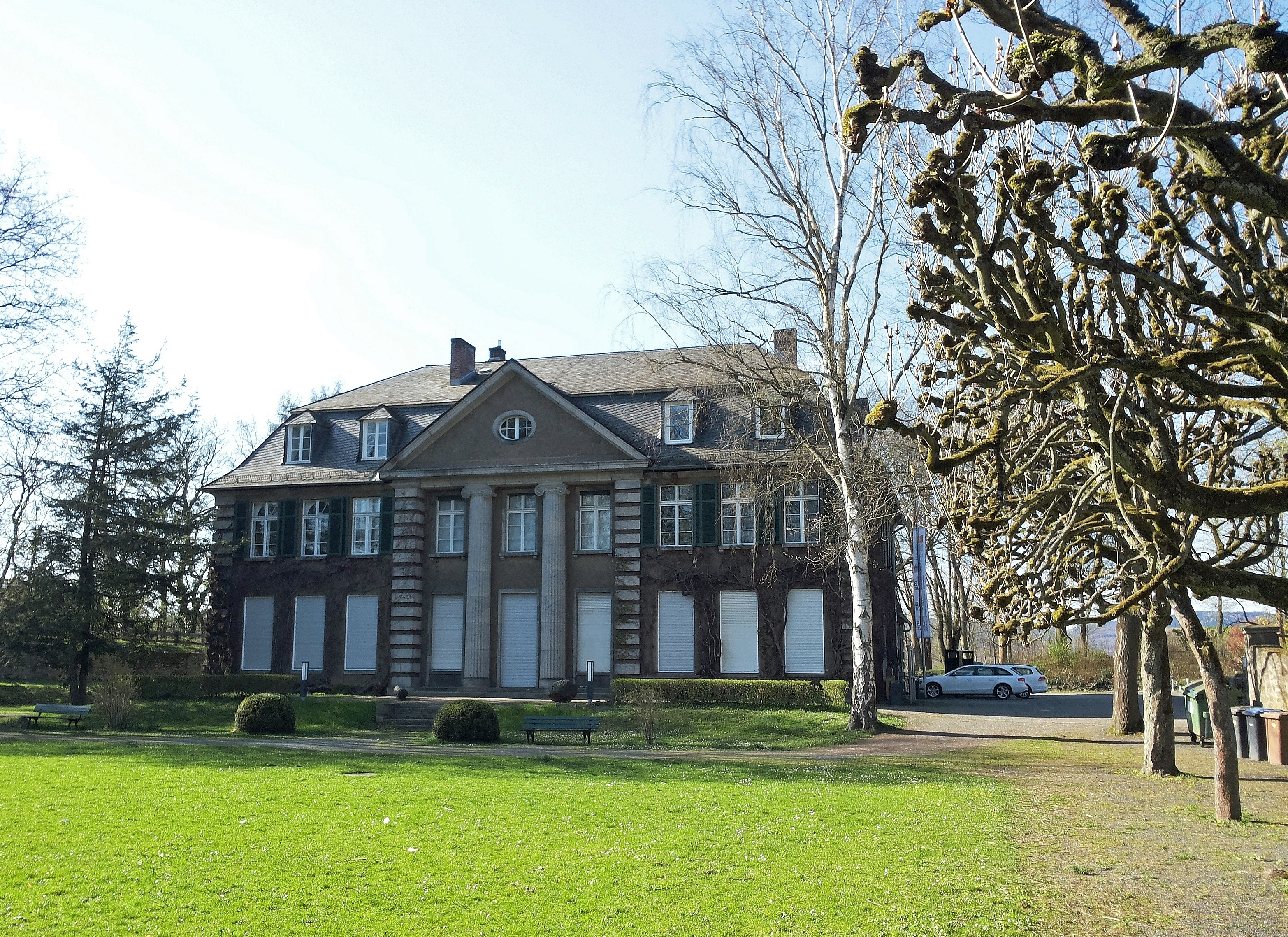 Dillenburg, denkmalgeschützte Grün'sche Villa, Schloßberg 3 (seit 1983 wirtschaftsgeschichtliches Museum)